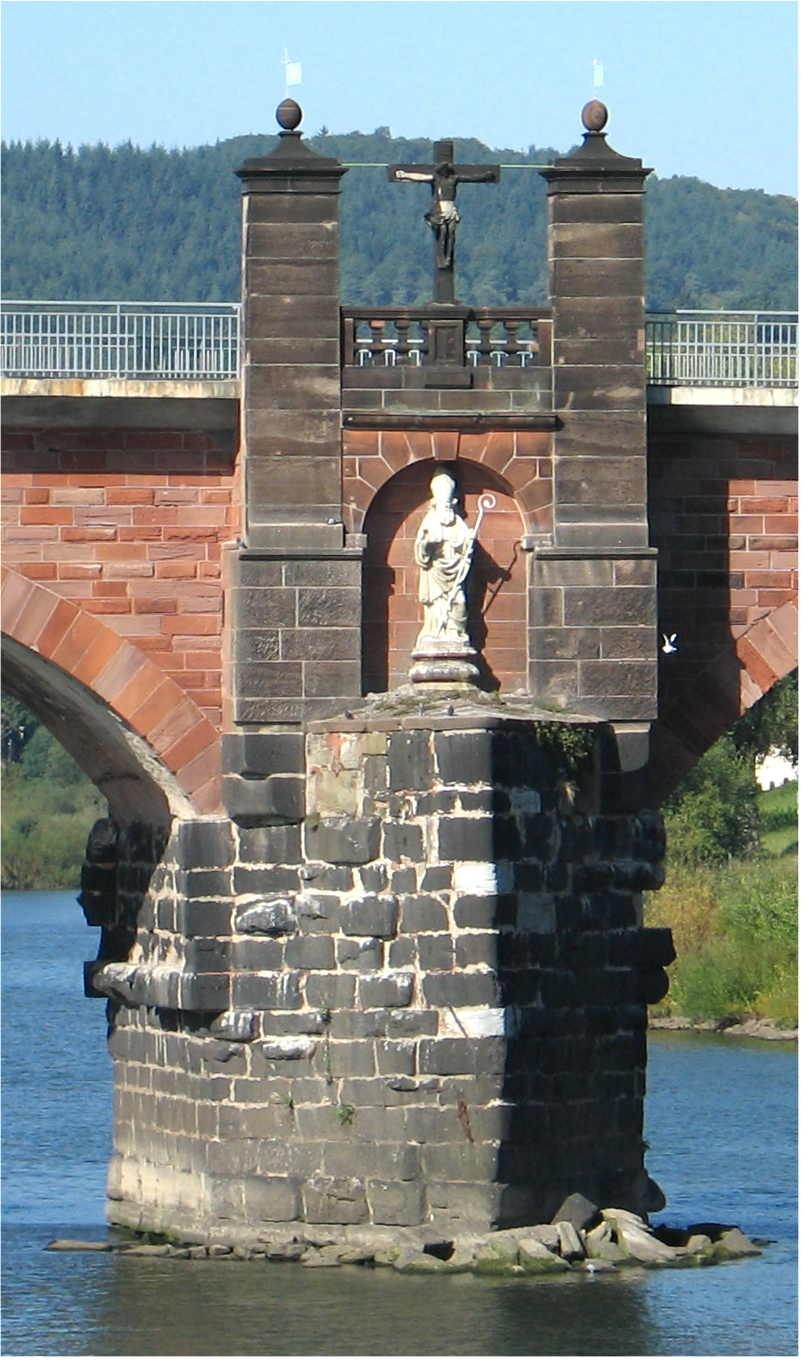 Sujet: Detail vun der Réimerbréck zu Tréier Source: Eege Foto User:Johnny Chicago Lizenz: GFDL